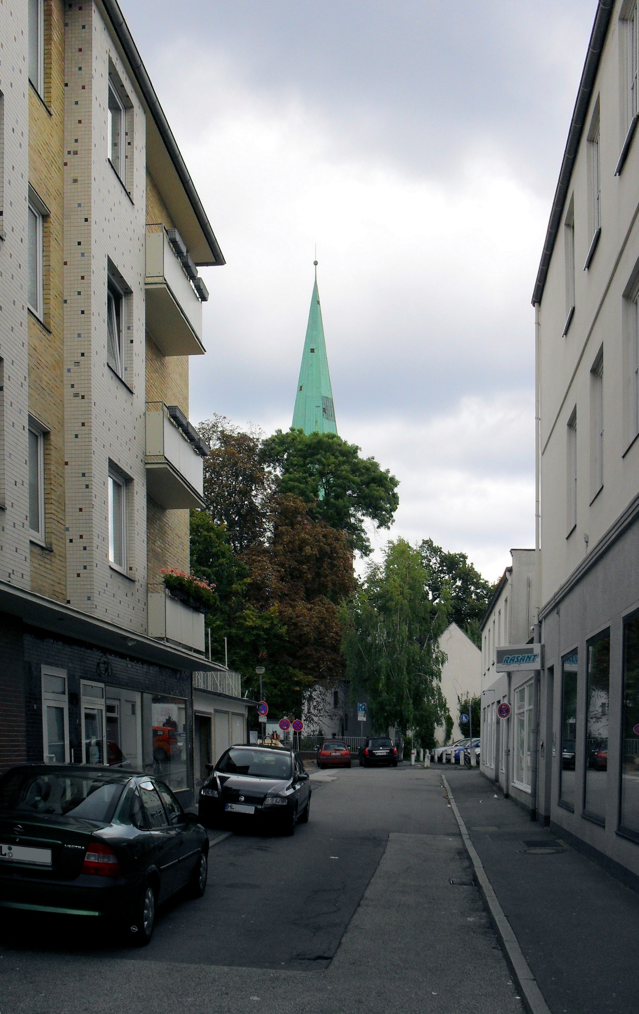 Der Pergamentmachergang in Lübeck